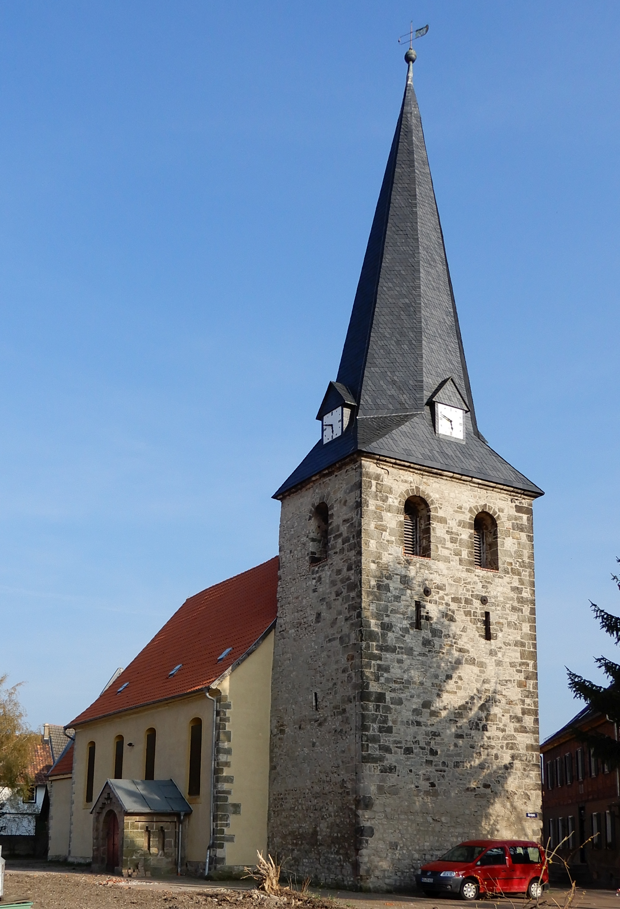 Evangelische Kirche St. Viti am Kirchplatz in Badeborn